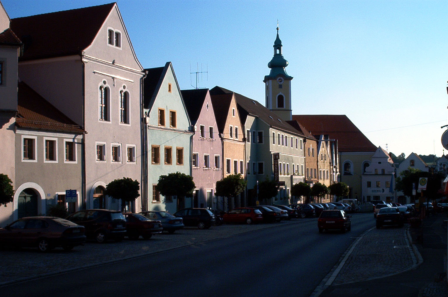 Neustadt a.d. Waldnaab - Deutschland/BY